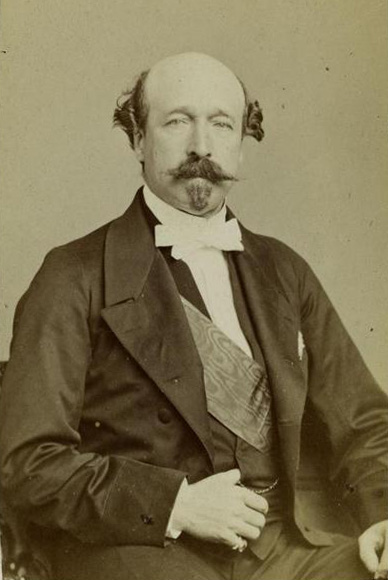 Portrait de Charles Louis Joseph, duc de Morny (1811-1865), officier, industriel, homme politique et ambassadeur.